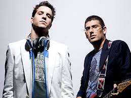 "חובבי ציון" נוי אלוש ודור דקל